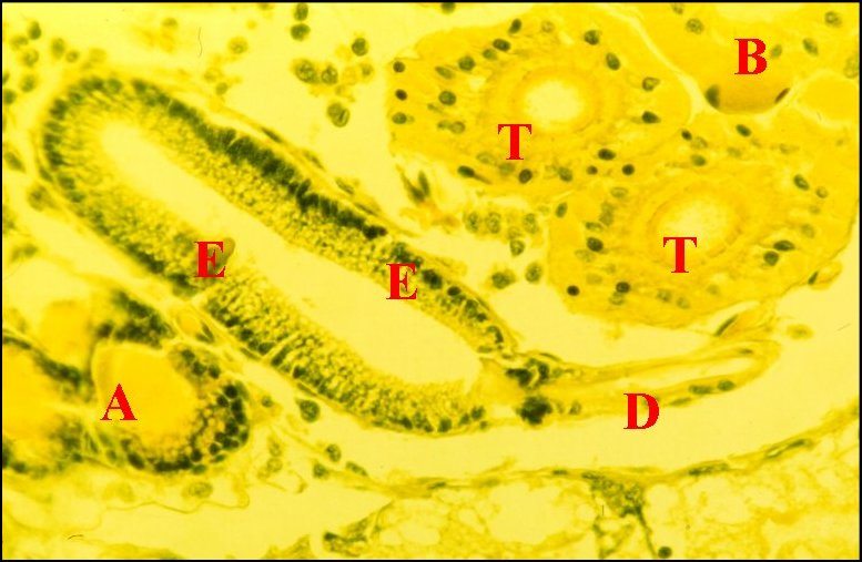 Flagelliforme et autres glandes Kaira